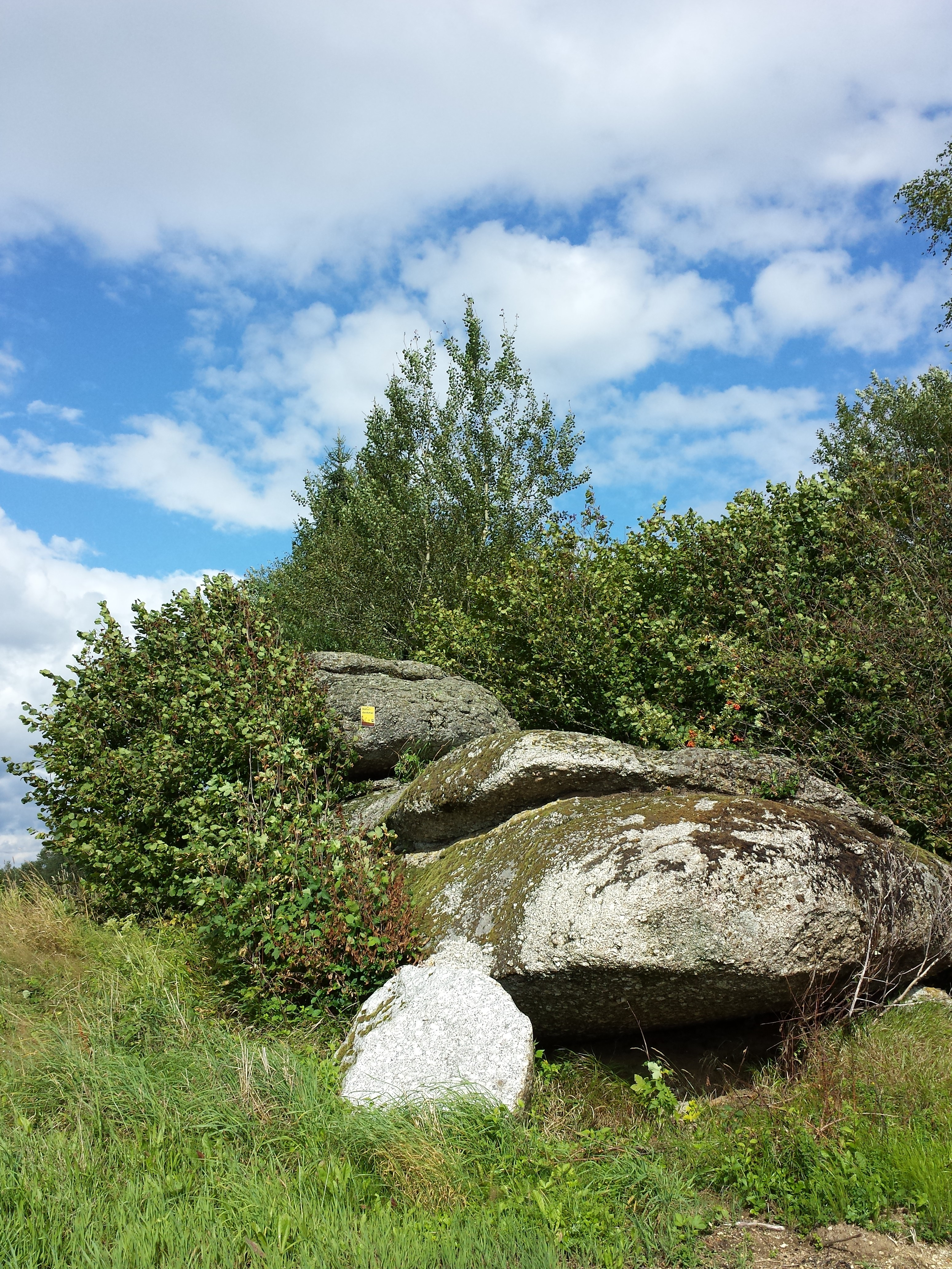 Wackelstein (Felsgebilde) This media shows the natural monument in Lower Austria with the ID ZT-092.